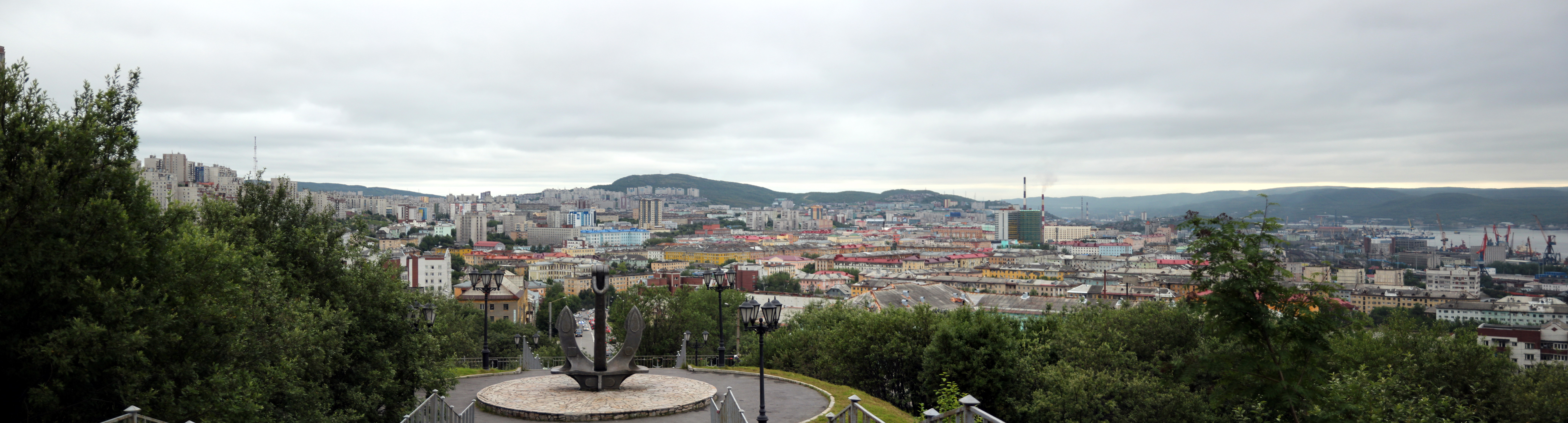 Панорама города Мурманска